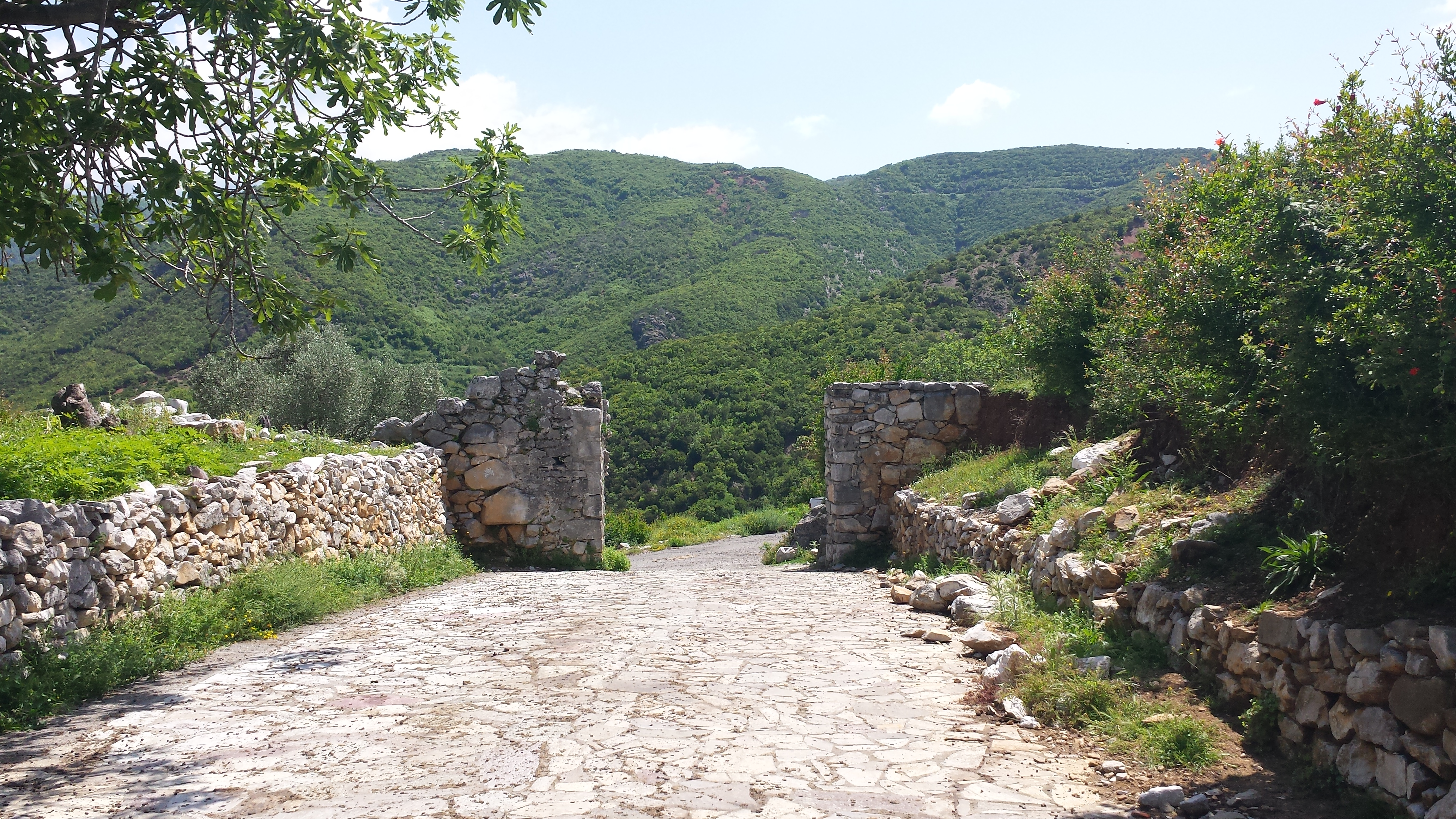 Kalaja e Drishtit